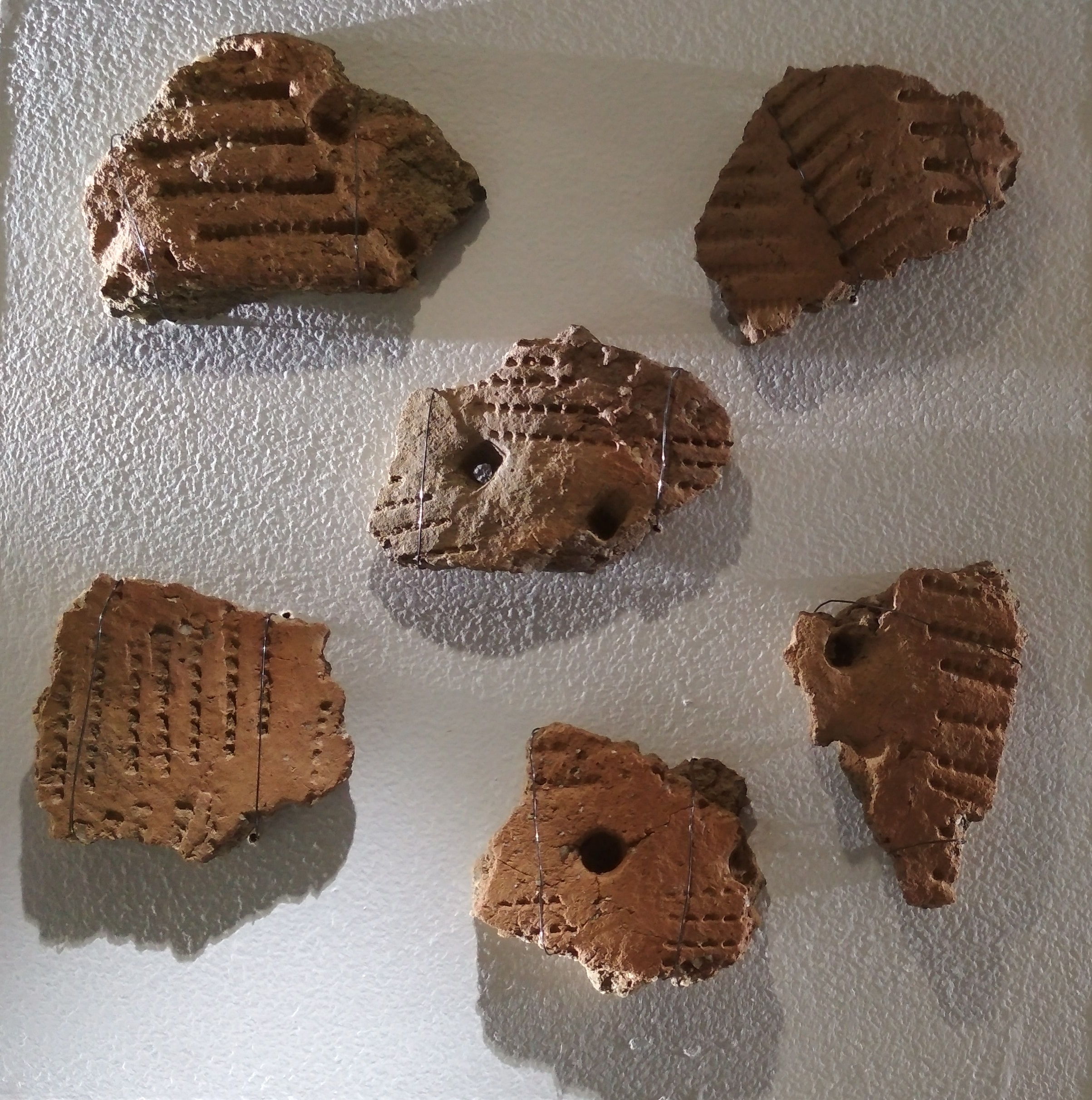 Kammivajutiste ja lohkudega ornameeritud kammkeraamika killud Sindi-Lodja III asulakohalt. Nõud on reeglina suuremõõdulised ning kumera põhjaga. Ca 2900-2000 eKr. (Pärnu Muuseum)